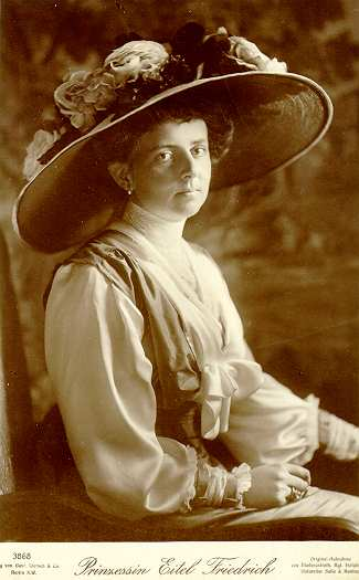 Ansichtskarte von Sophie Charlotte von Oldenburg (Gemahlin von Eitel Friedrich von Preußen).